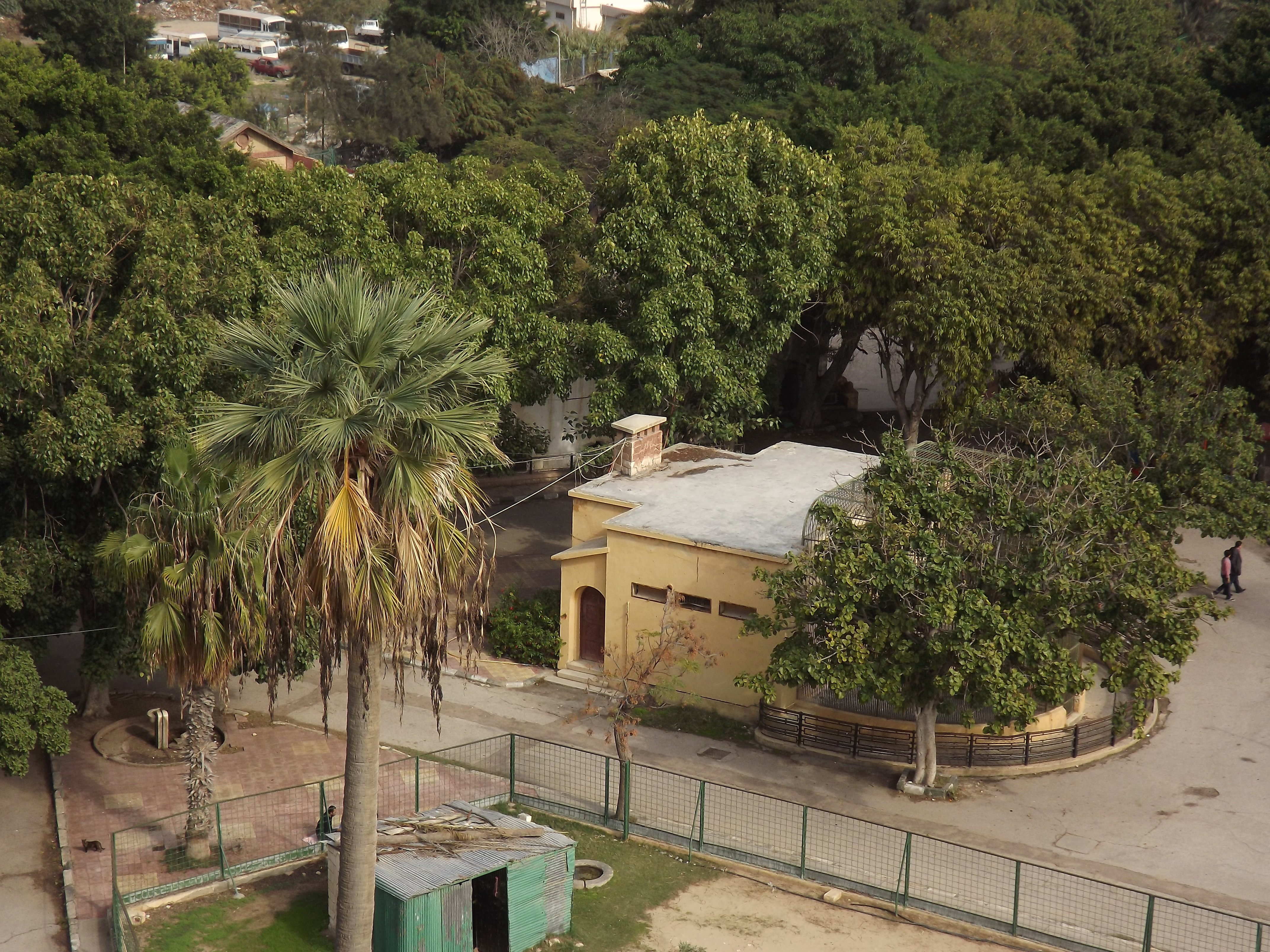 حديقة حيوان النزهة - الاسكندرية